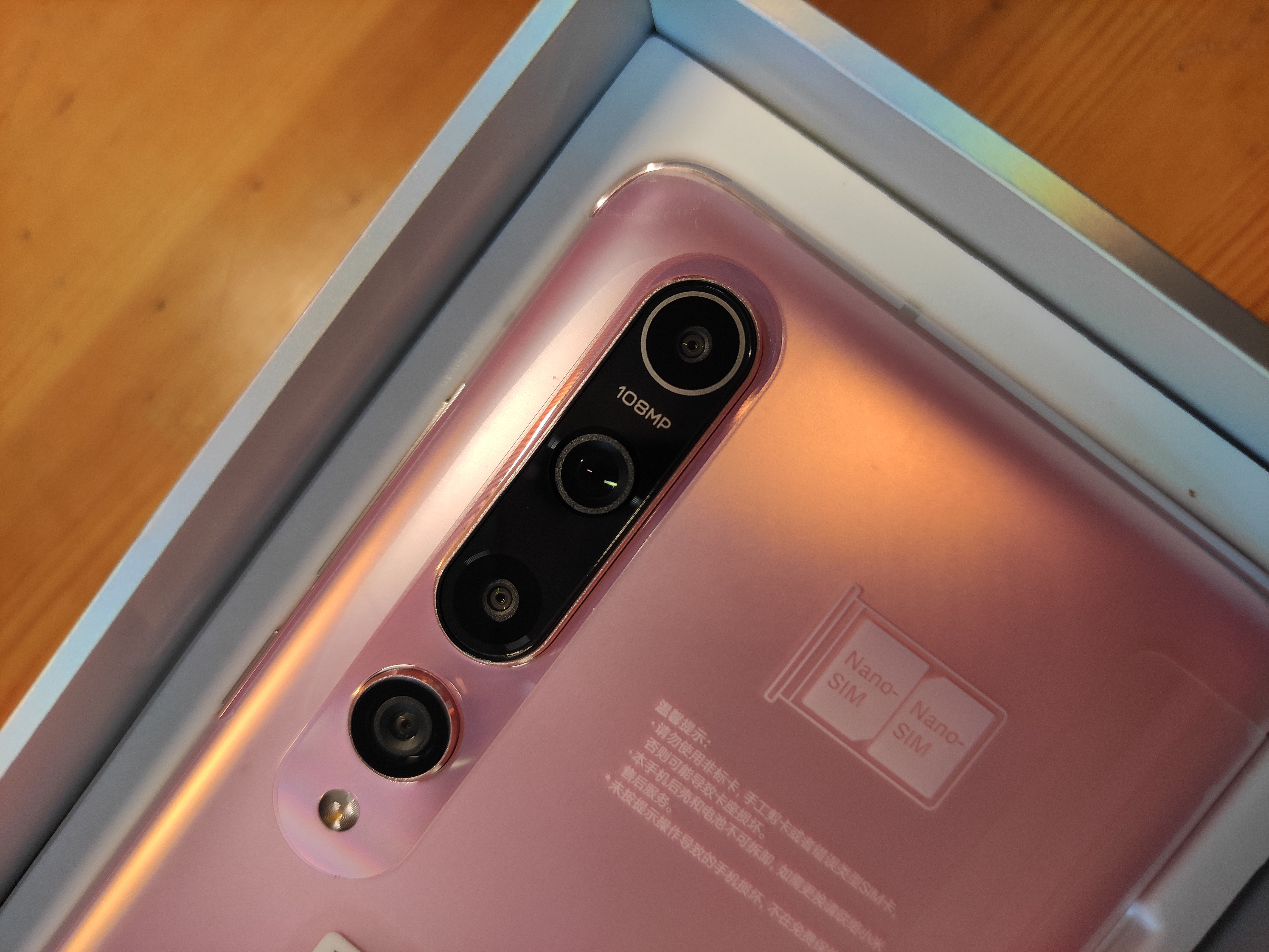 中文（中国大陆）: 小米10蜜桃金配色主相机镜组特写